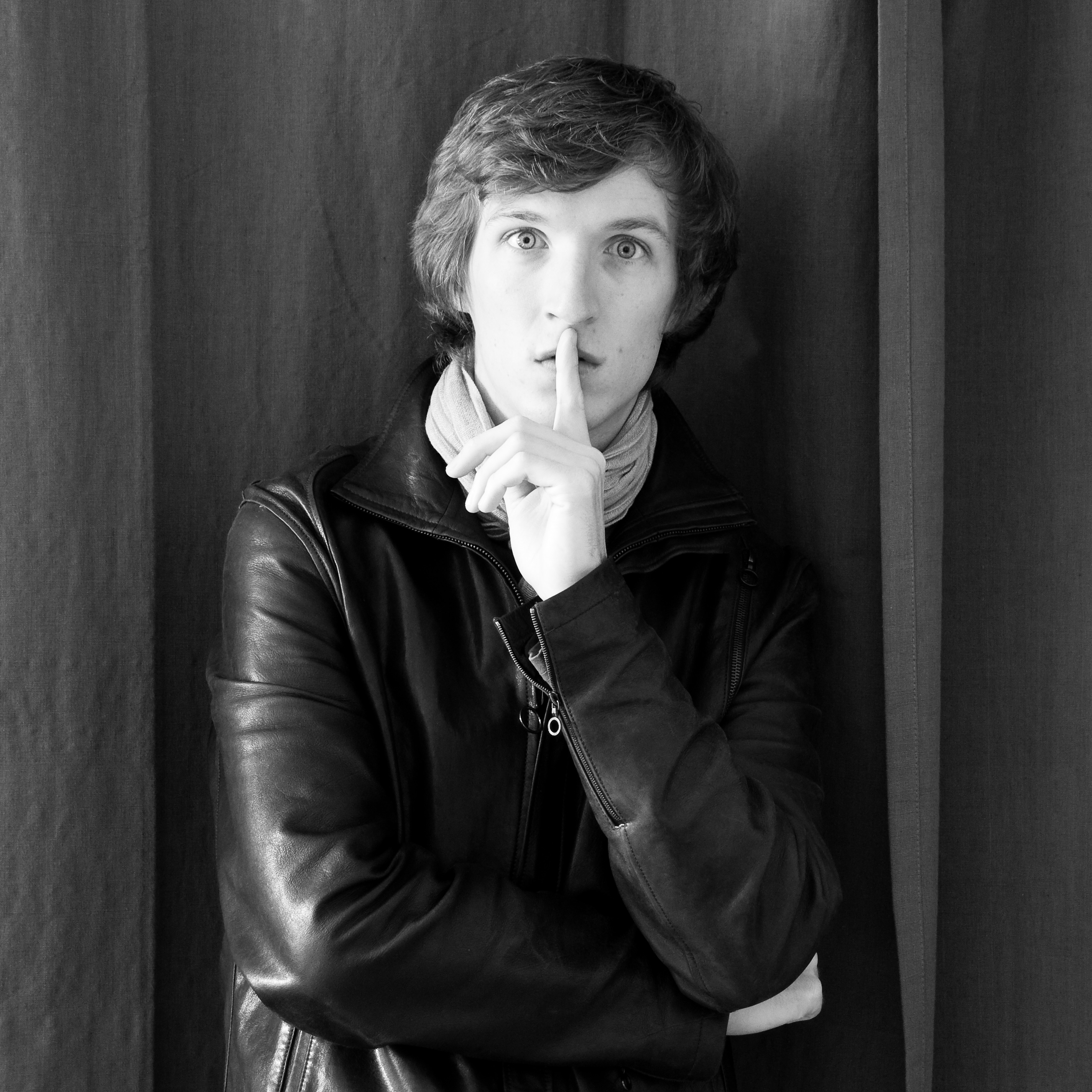 Auto-portrait, Benjamin Righetti